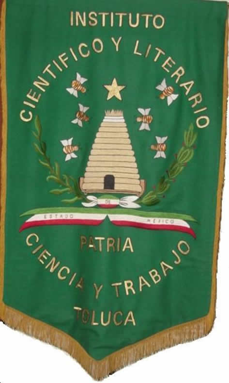 El estandarte del Instituto Científico y Literario